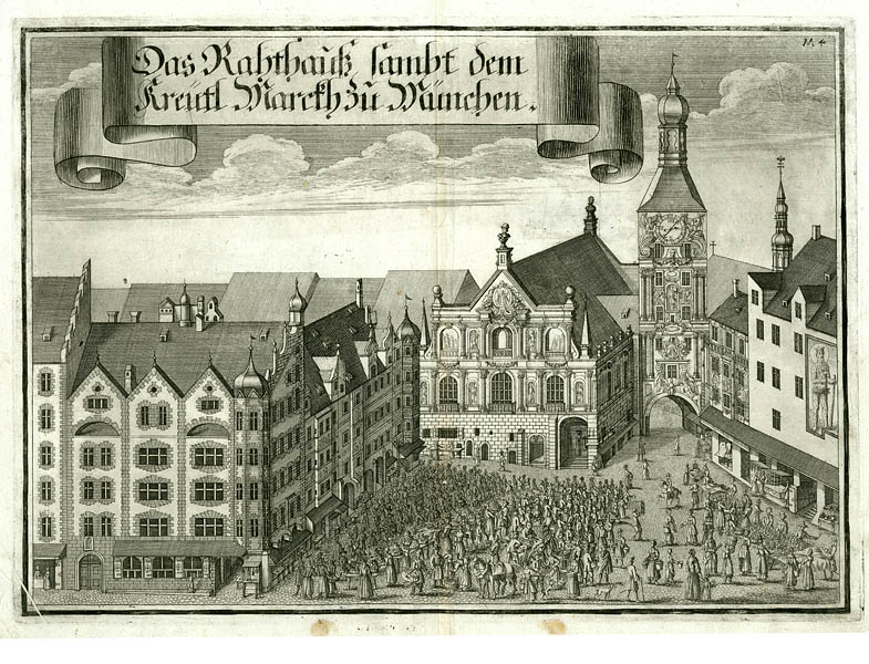 "Das Rahthauß sambt dem Kreütl Marckh zu München", 1701